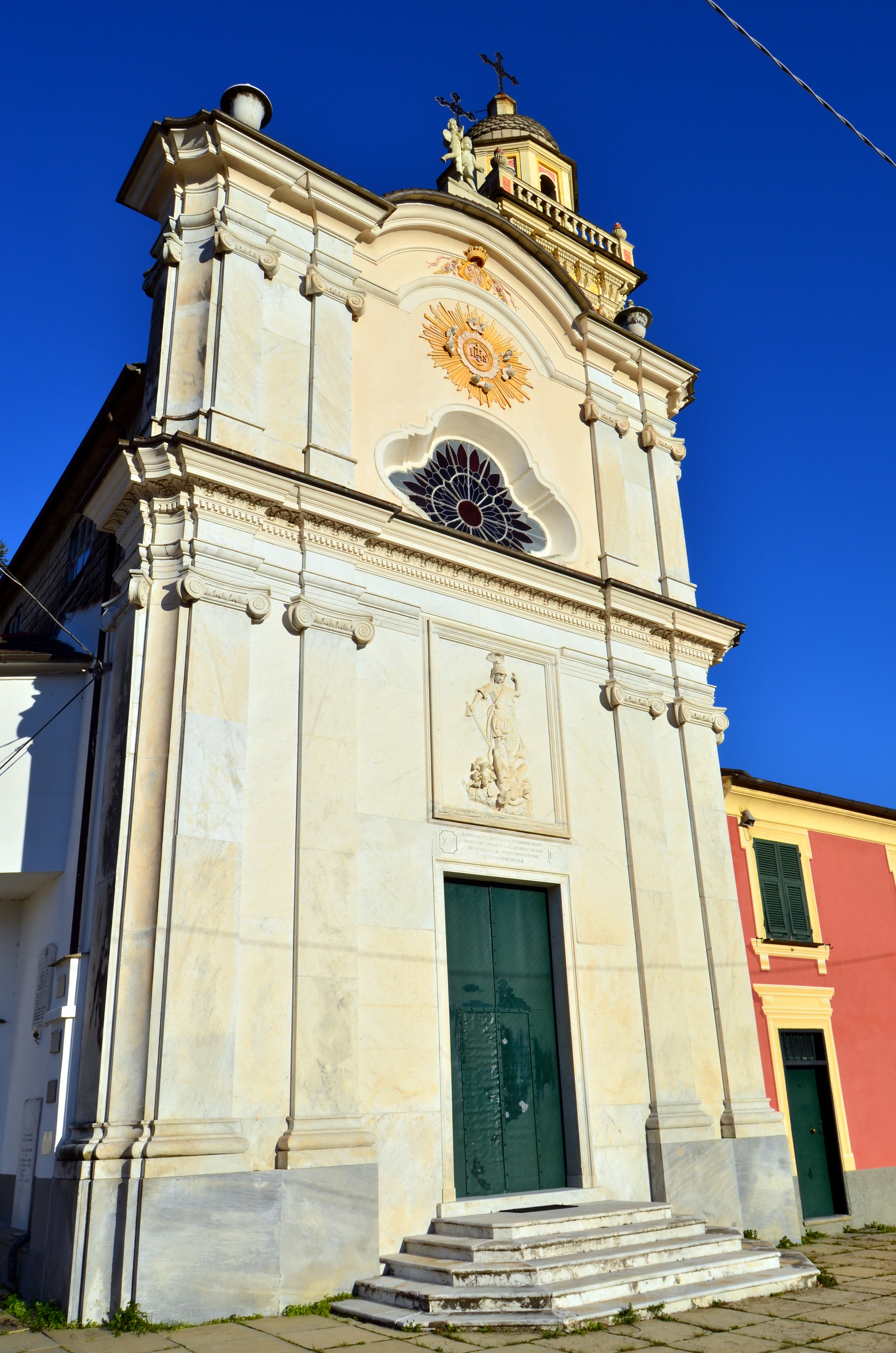 La chiesa di San Michele, Soglio, Orero, Liguria, Italia